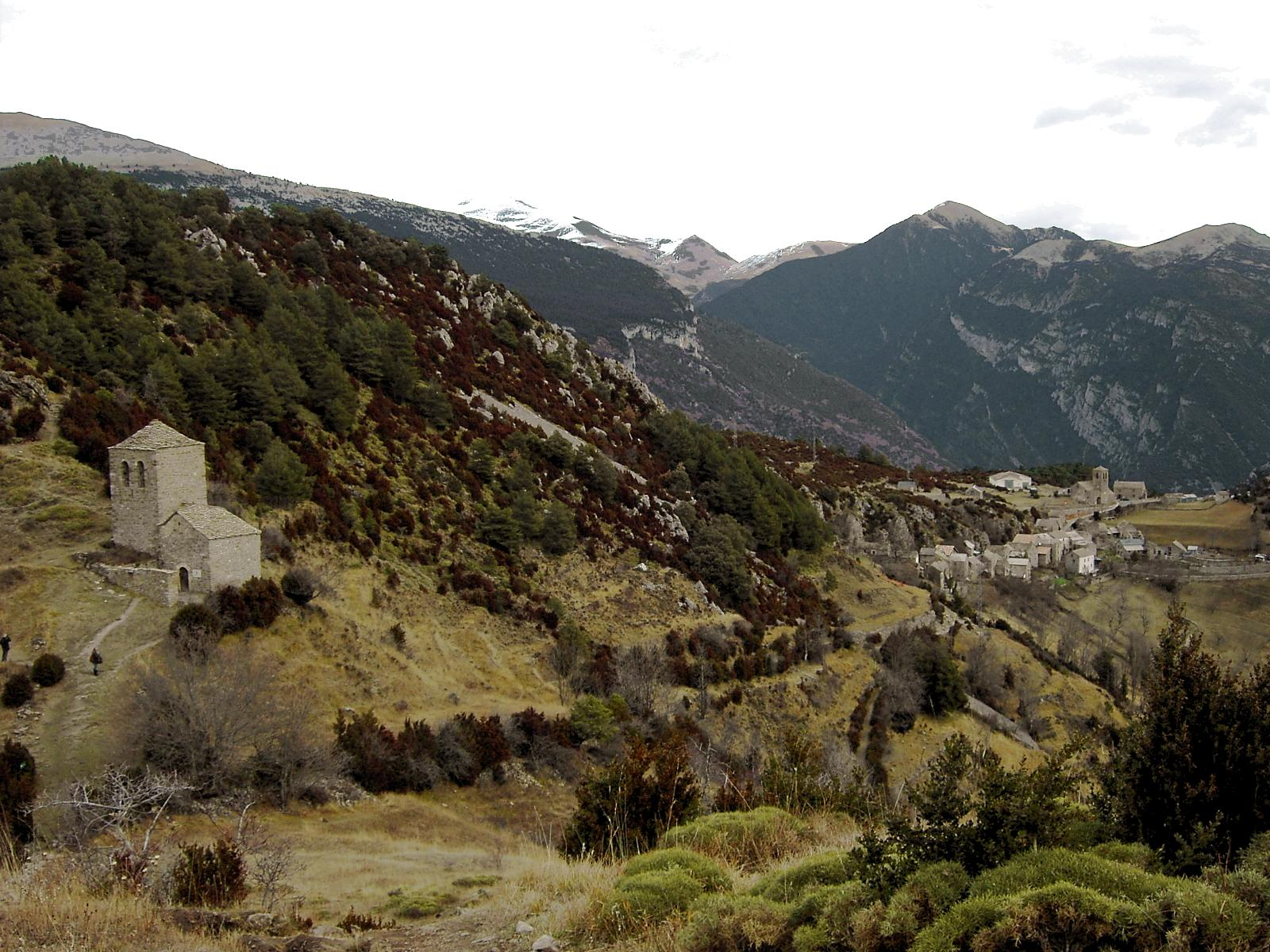 Aragonés: Plano general de Tella e la ermita de Santa María de Faixaniellas.